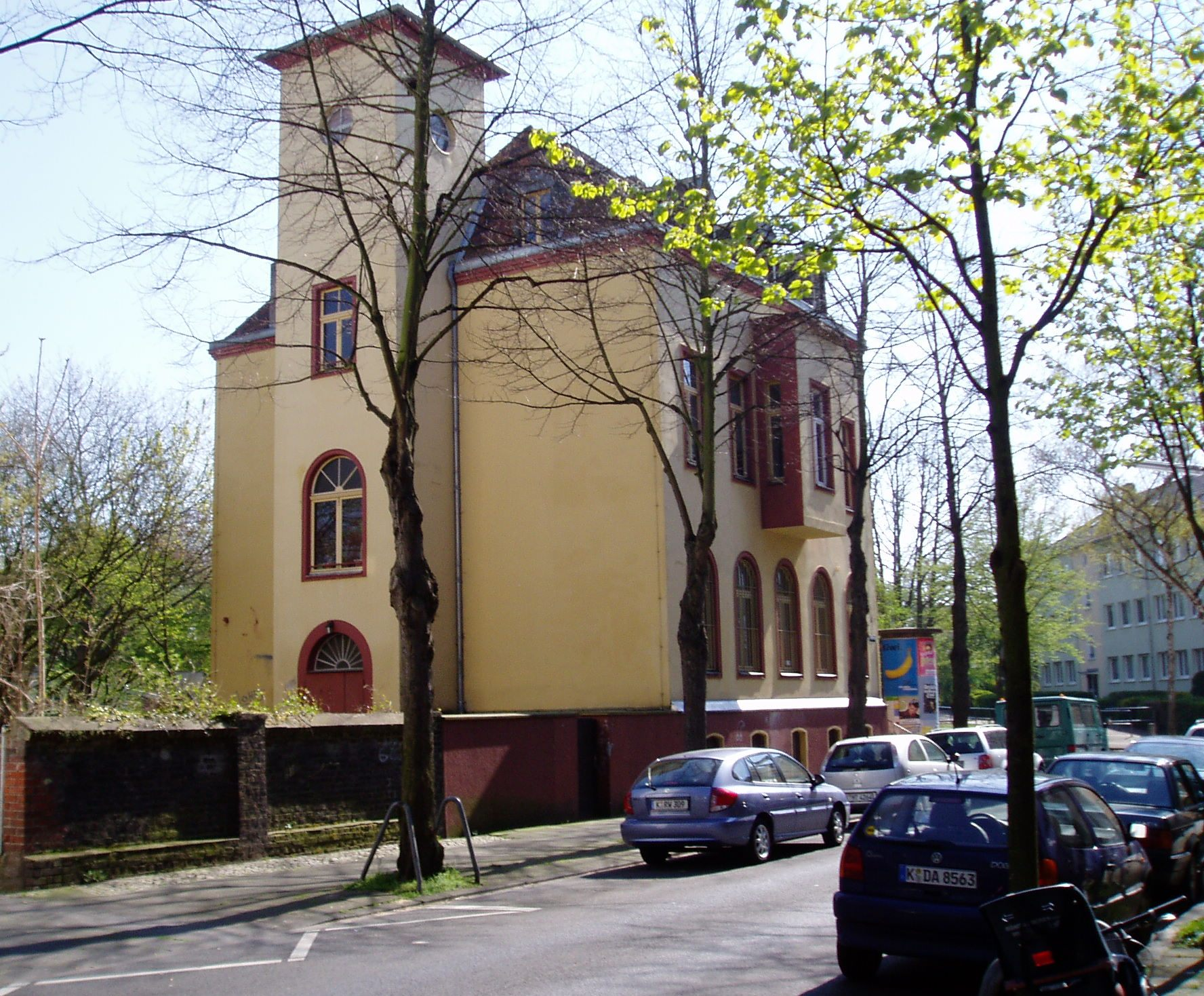 ehemaliges Bürgermeisterei Vingst, jetzt Jugendzentrum „Et Sozi“